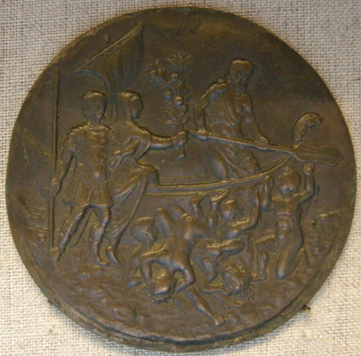 Maestro della leggenda di orfeo, enea e la sibilla cumana entrano nella barca di caronte, 1500-1525 circa